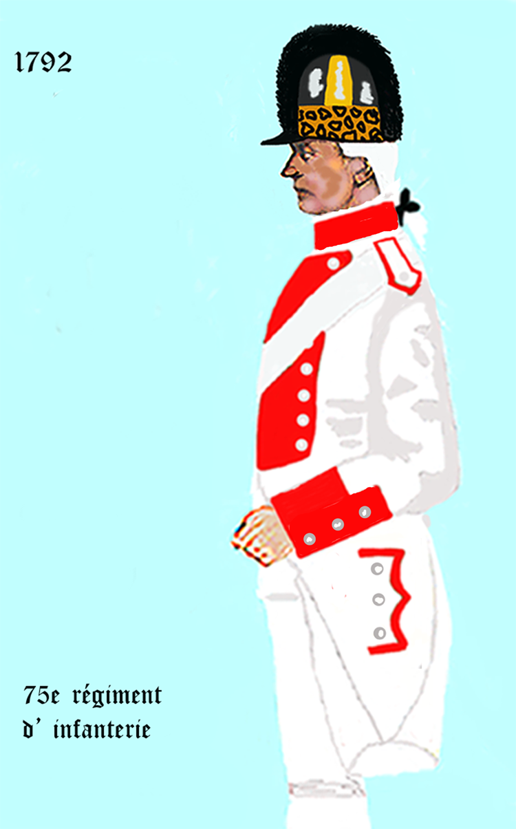 Uniform eines königlich französischen Infanterie-Regiments gemäß Dekret von 1792. - Entnommen und überarbeitet aus: „LES UNIFORMES ET LES DRAPEAUX DE L'ARMÉE DU ROI“ Marseille 1899.